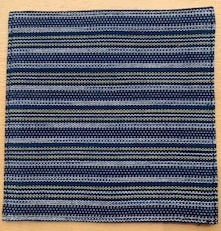 福井県鯖江市で織られていた石田縞の生地。